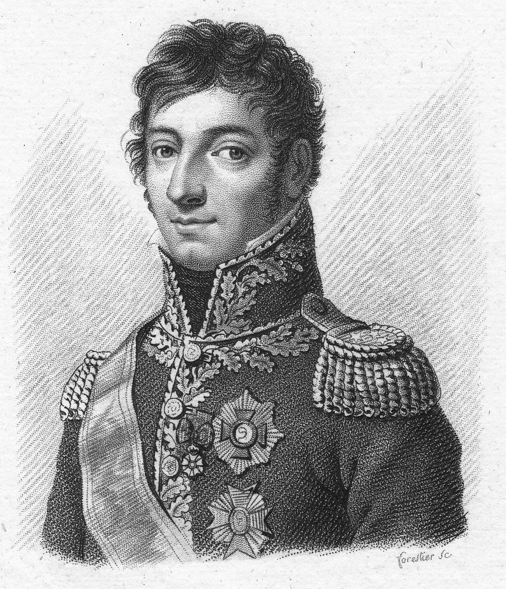 Général_Charles_Lefebvre_Desnouette